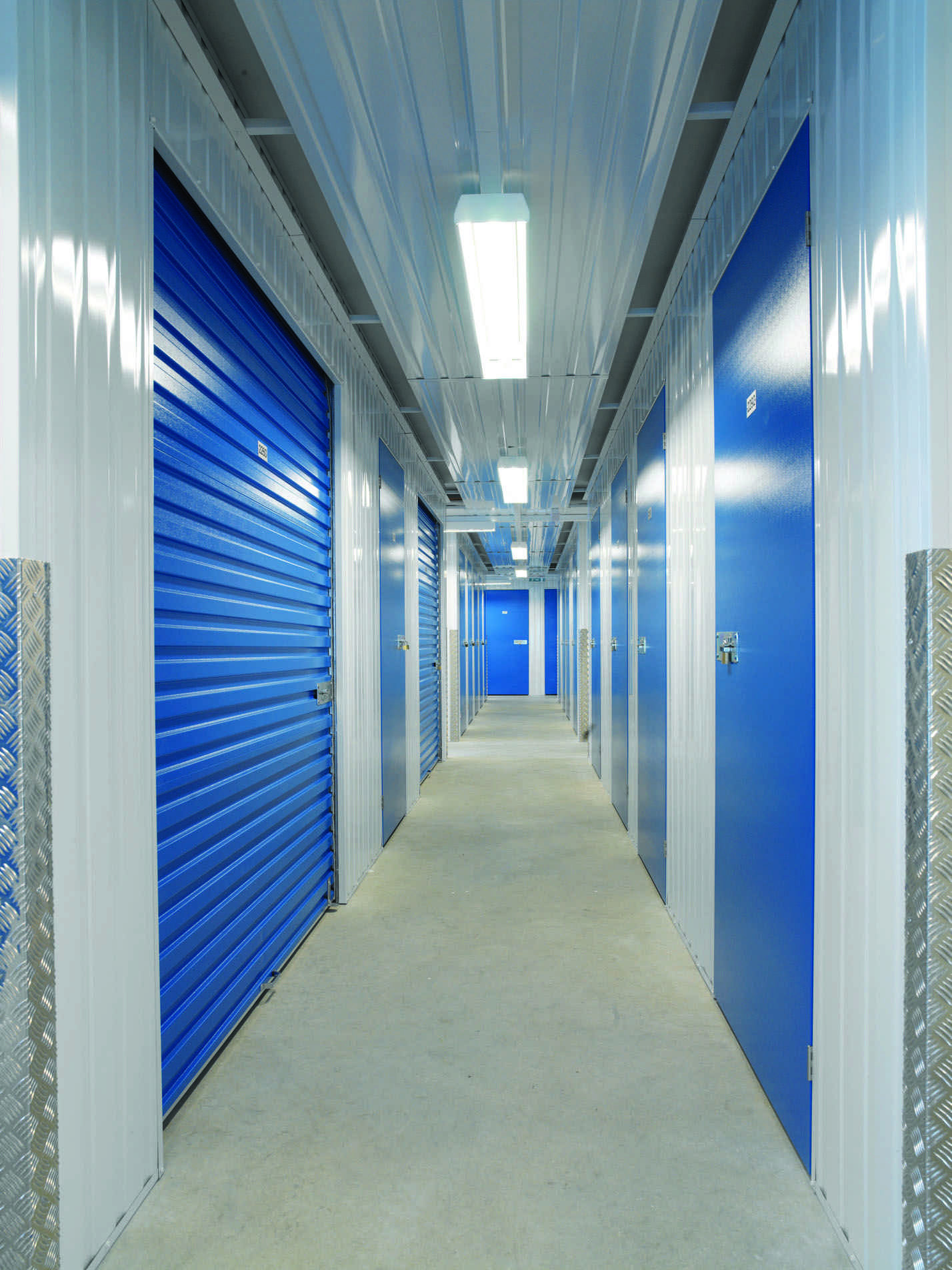 Flur bei MyPlace-SelfStorage